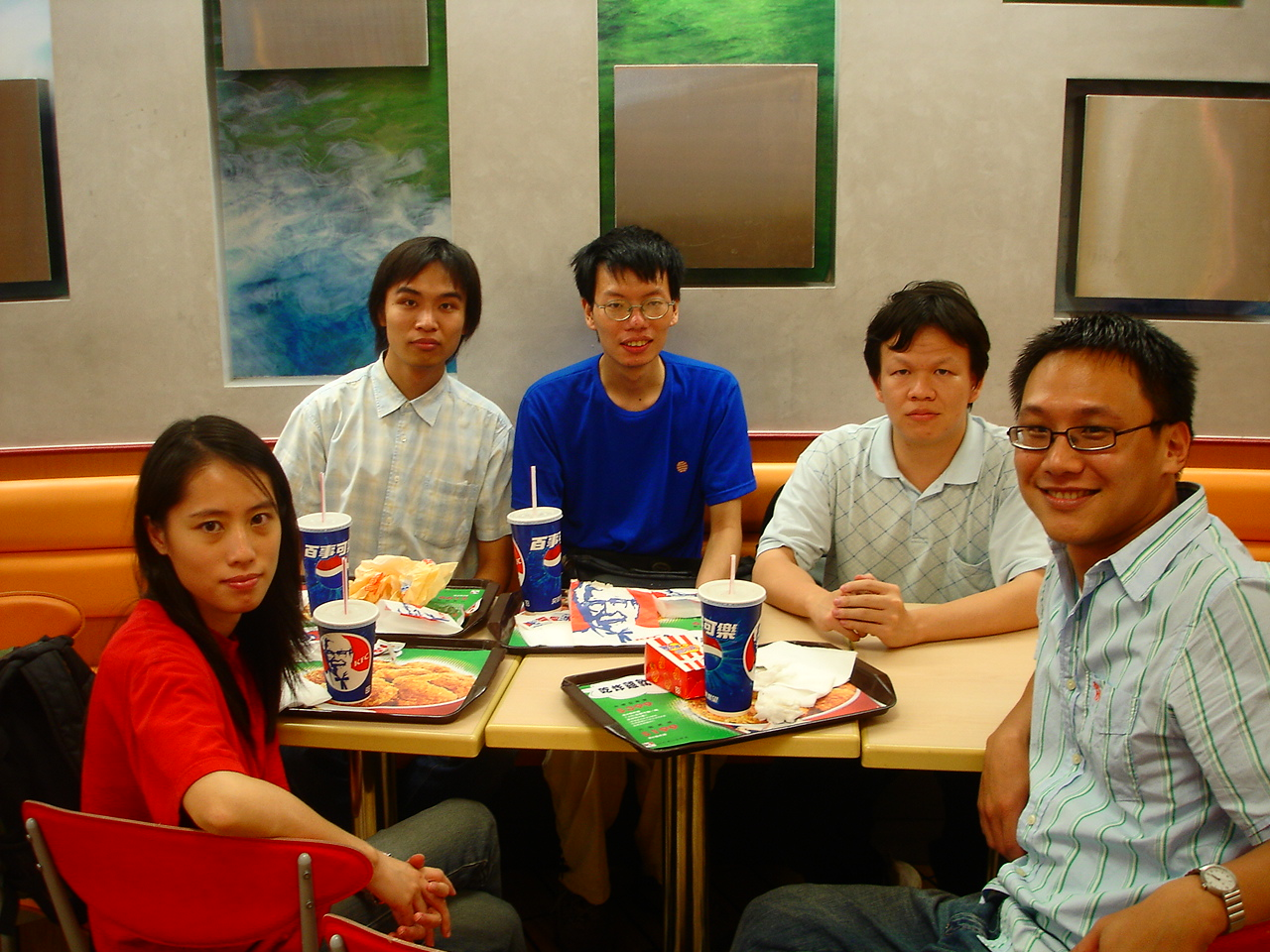 2005年台灣維基人新竹秋聚照片。這是討論完事情之後去肯德基吃點心時才想到照的相。